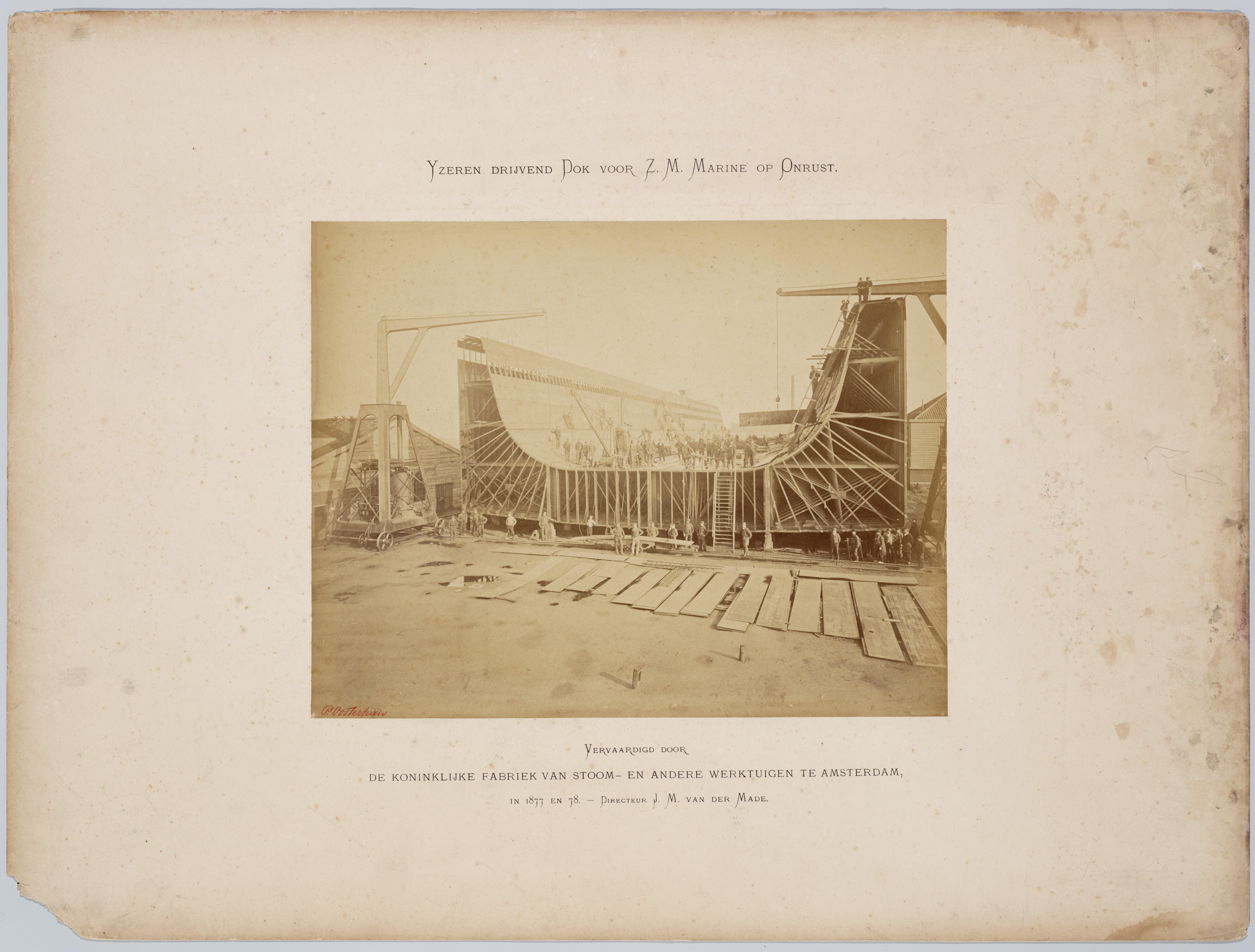 Beschrijving IJzeren drijvend Dok voor Z.M. Marine op Onrust Vervaardigd door de Koninklijke Fabriek van Stoom- en andere Werktuigen te Amsterdam, in 1877 en 78. - Directeur J.M. van der Made De foto maakt deel uit van een reeks foto's die Pieter Oosterhuis en zijn zoon Gustaaf maakten voor de Koninklijke Fabriek. Serie: Oosterhuis, Koninklijke Fabriek van Stoom- en andere Werktuigen Documenttype foto Vervaardiger Oosterhuis, Pieter Collectie Collectie Stadsarchief Amsterdam: foto-afdrukken Datering 25 juni 1878 Inventarissen Afbeeldingsbestand OSIM00005001059 Generated with Dememorixer